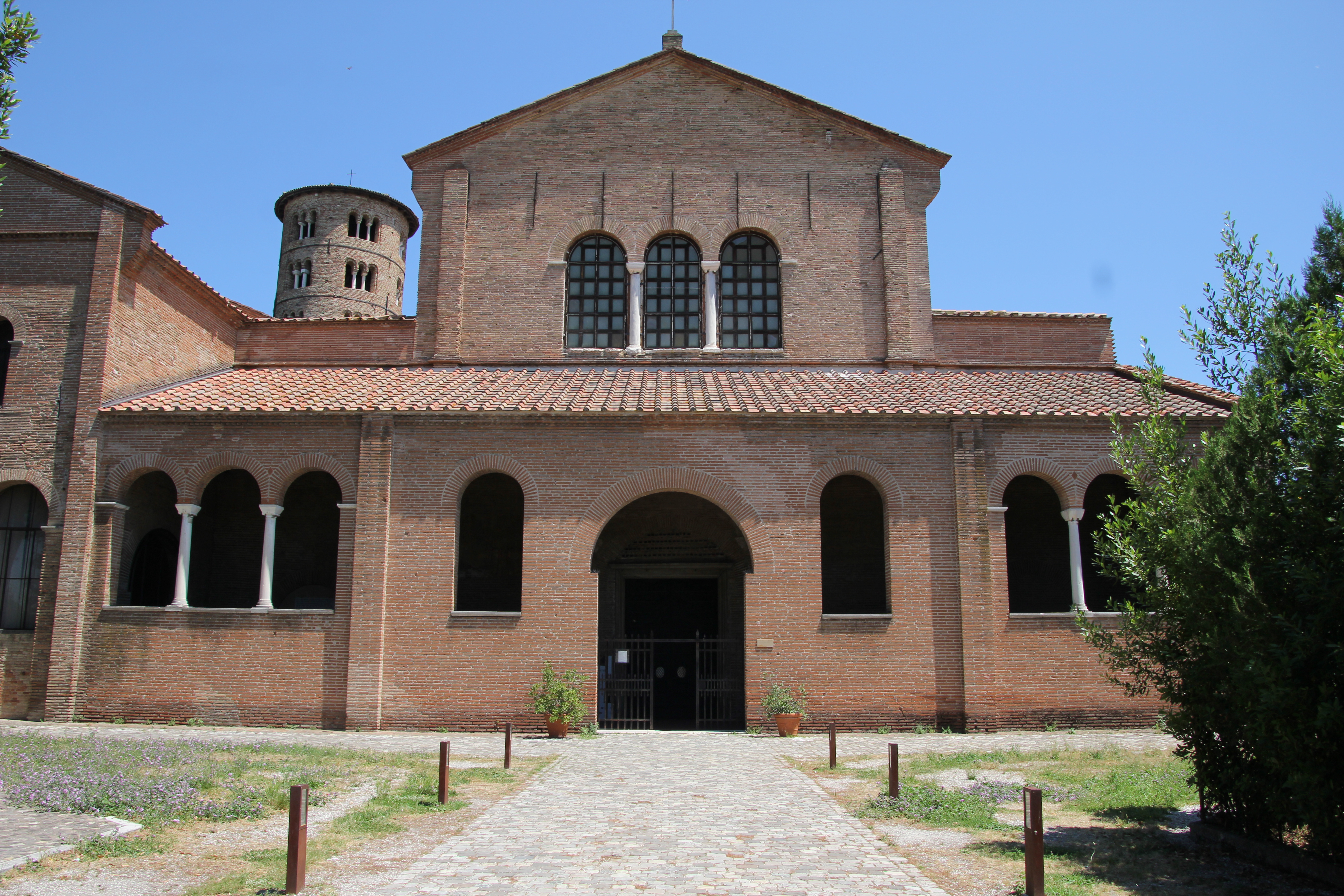 Ravenna, basilica di Sant'Apollinare in Classe